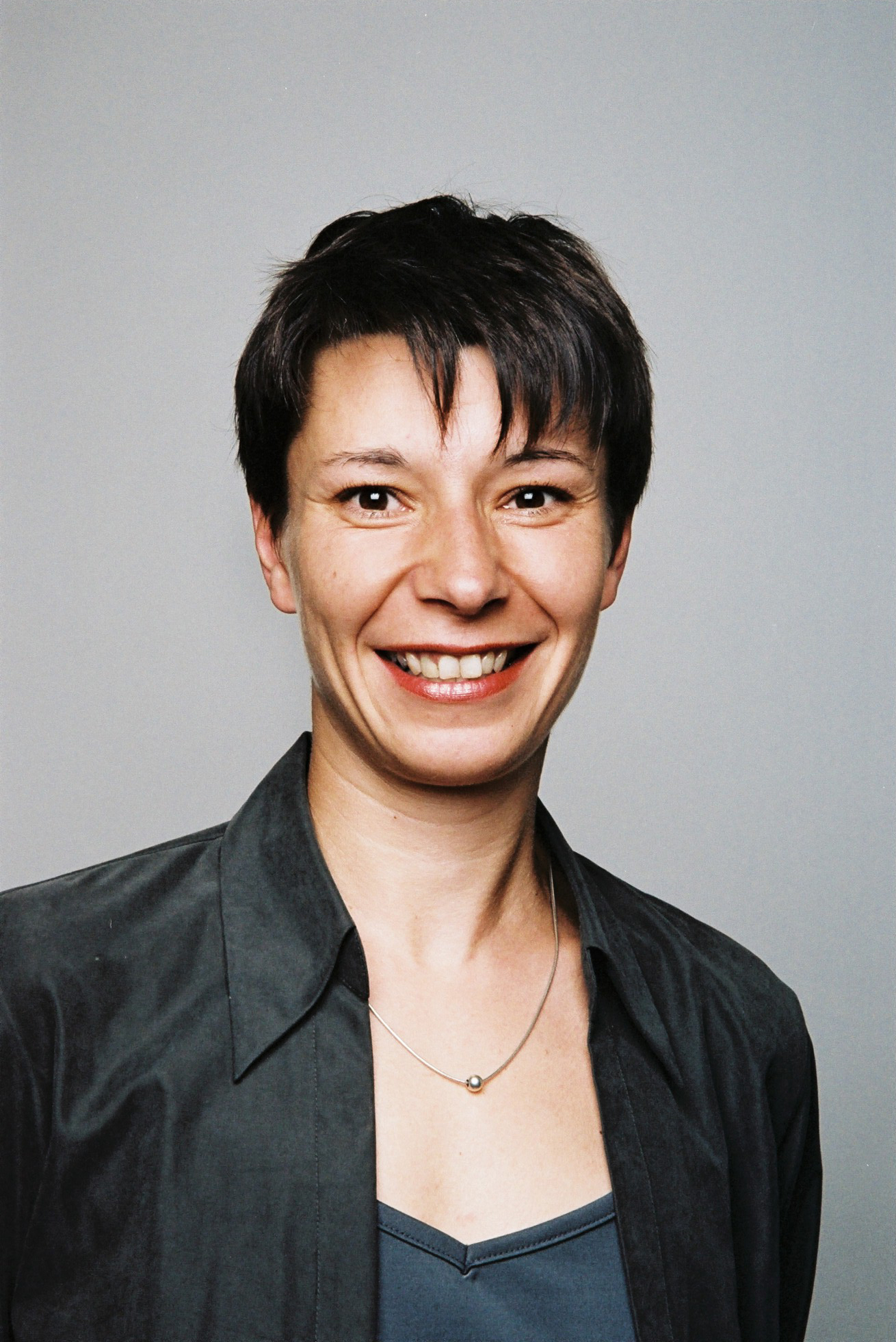 Die Bundesrätin Elisabeth Kerschbaum